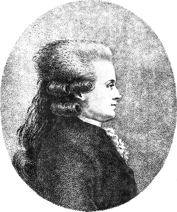 Portrait de Jean-Jacques Duval d'Eprémesnil (1745-1794), magistrat et pamphlétaire français.